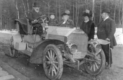 Hybridfahrzeug auf der Basis eines Laurin&Klement E aus dem Jahr 1908